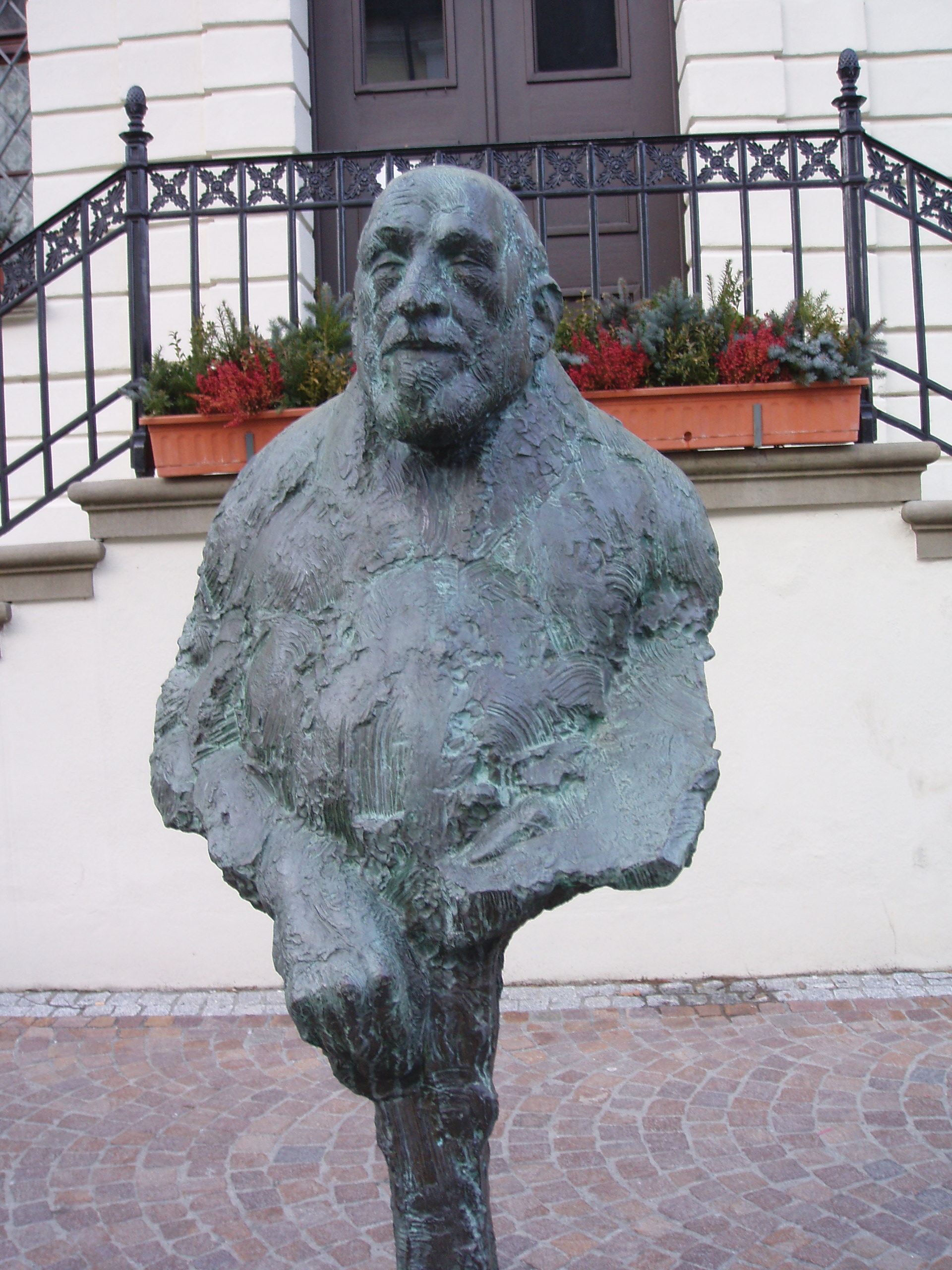 Portraitstele "Hans Purrmann" in Langenargen